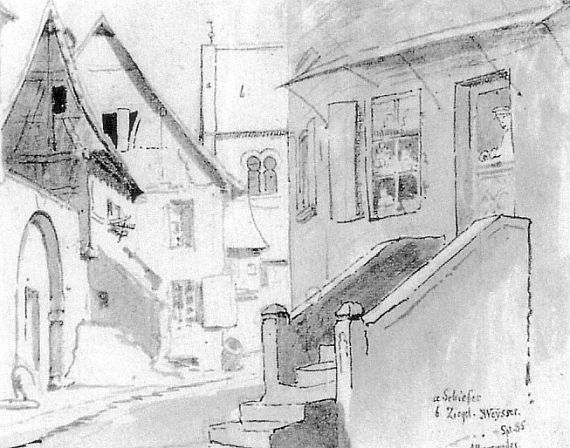 "Straßenpartie bei der Pfarrkirche in Albersweiler"